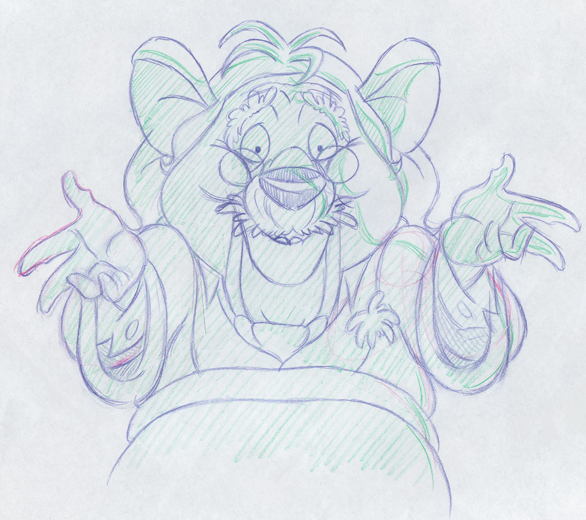 Bob Poliakoffa a Macskafogó 2-ből